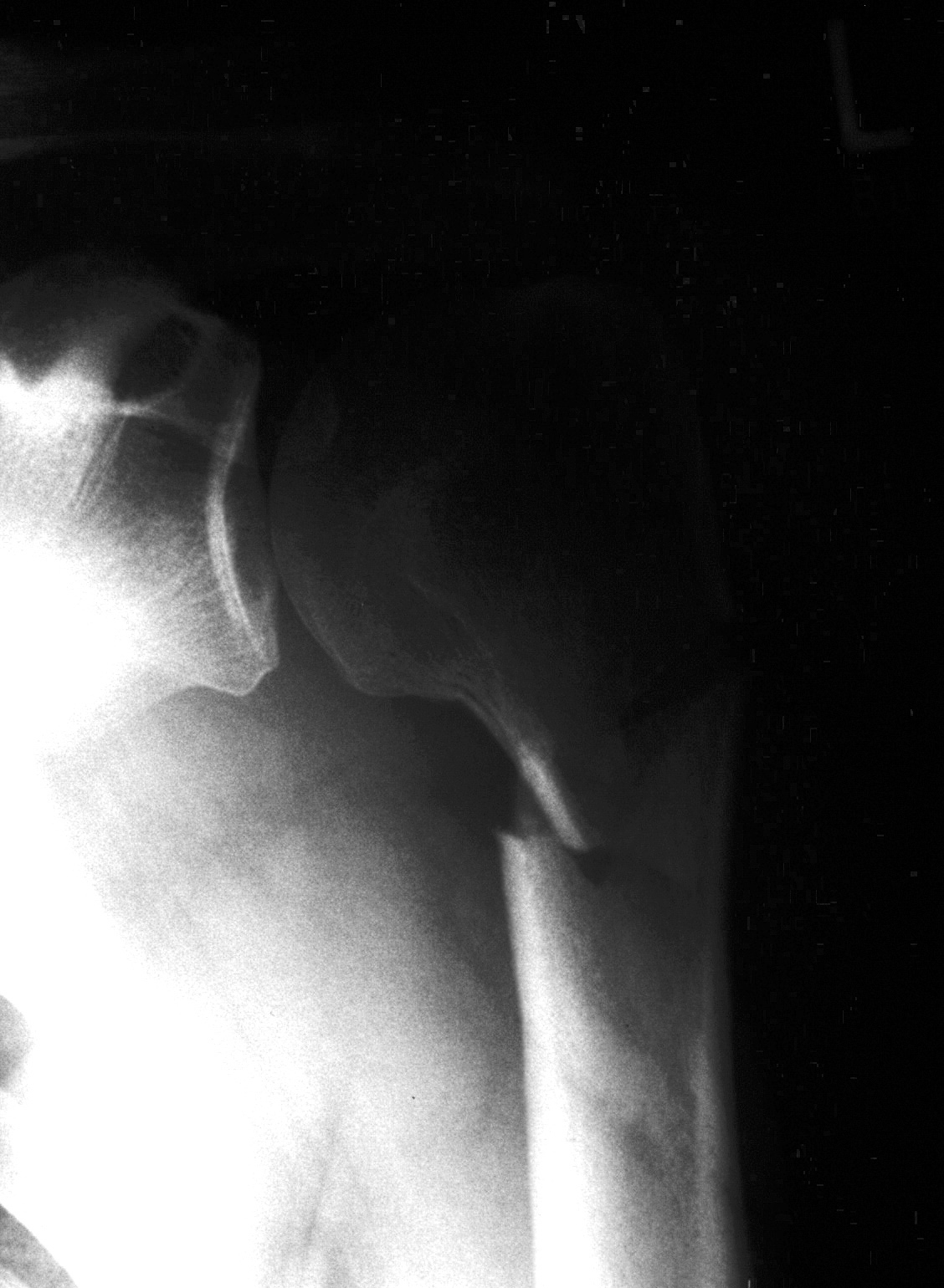 Proximale Humerusschaftfraktur, Versorgung mit winkelstabiler Platte